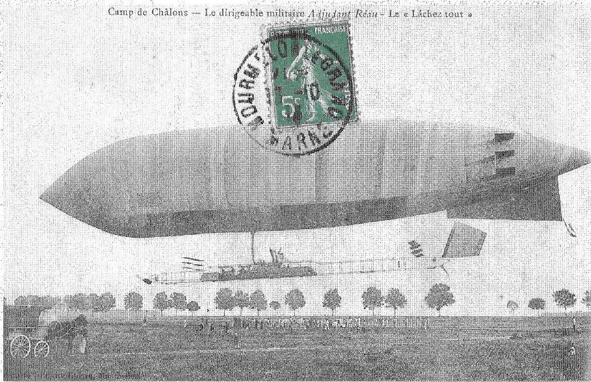 Le dirigeable Adjudant_Réau au moment du Lachez_tout, camp de châlons.